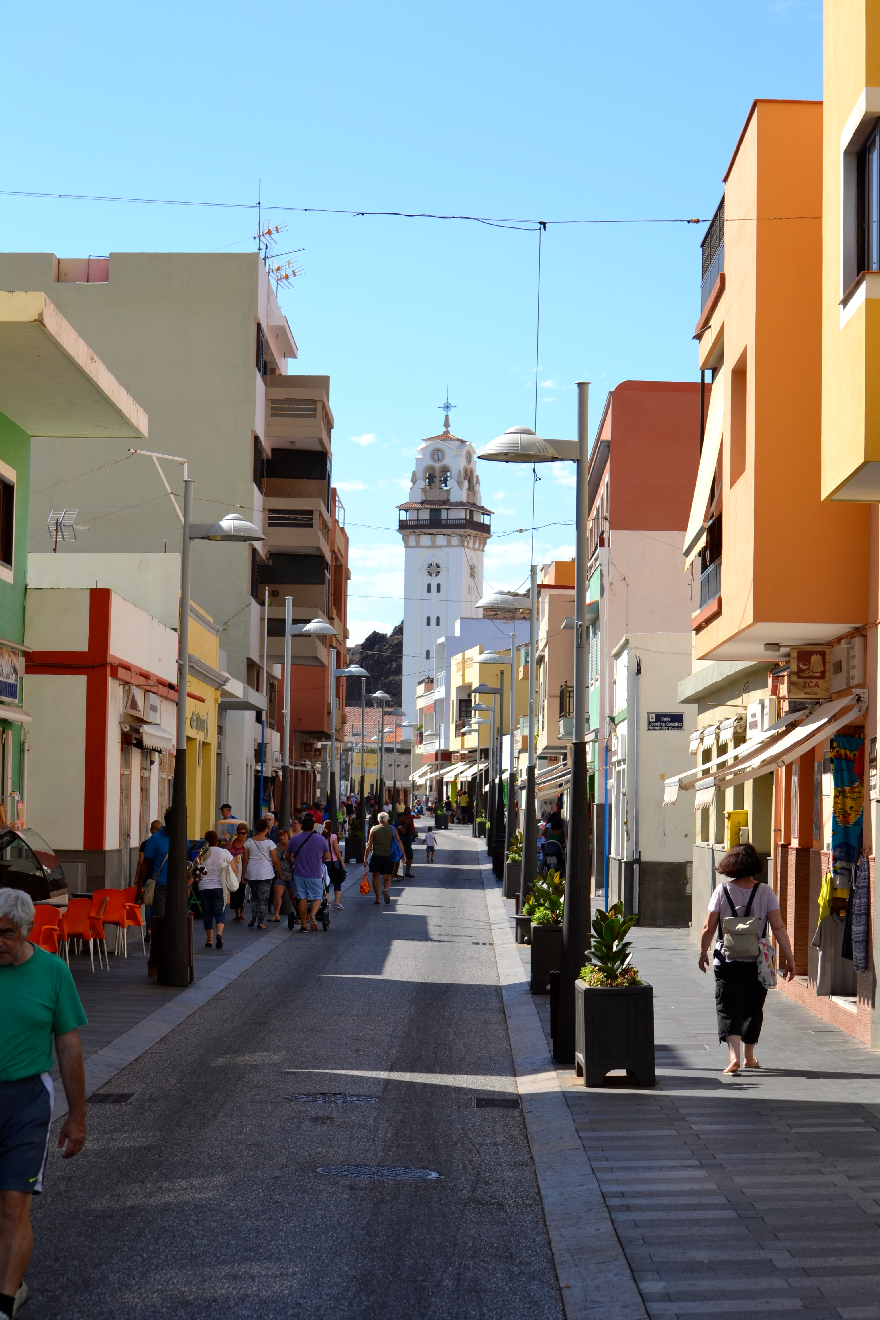 Colección Basílica de Candelaria by Ángel Suárez - elduendesuarez